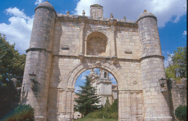 Monasterio. Entrada - La Santa Espina (Valladolid) - Diapositiva 48 x 48 Color